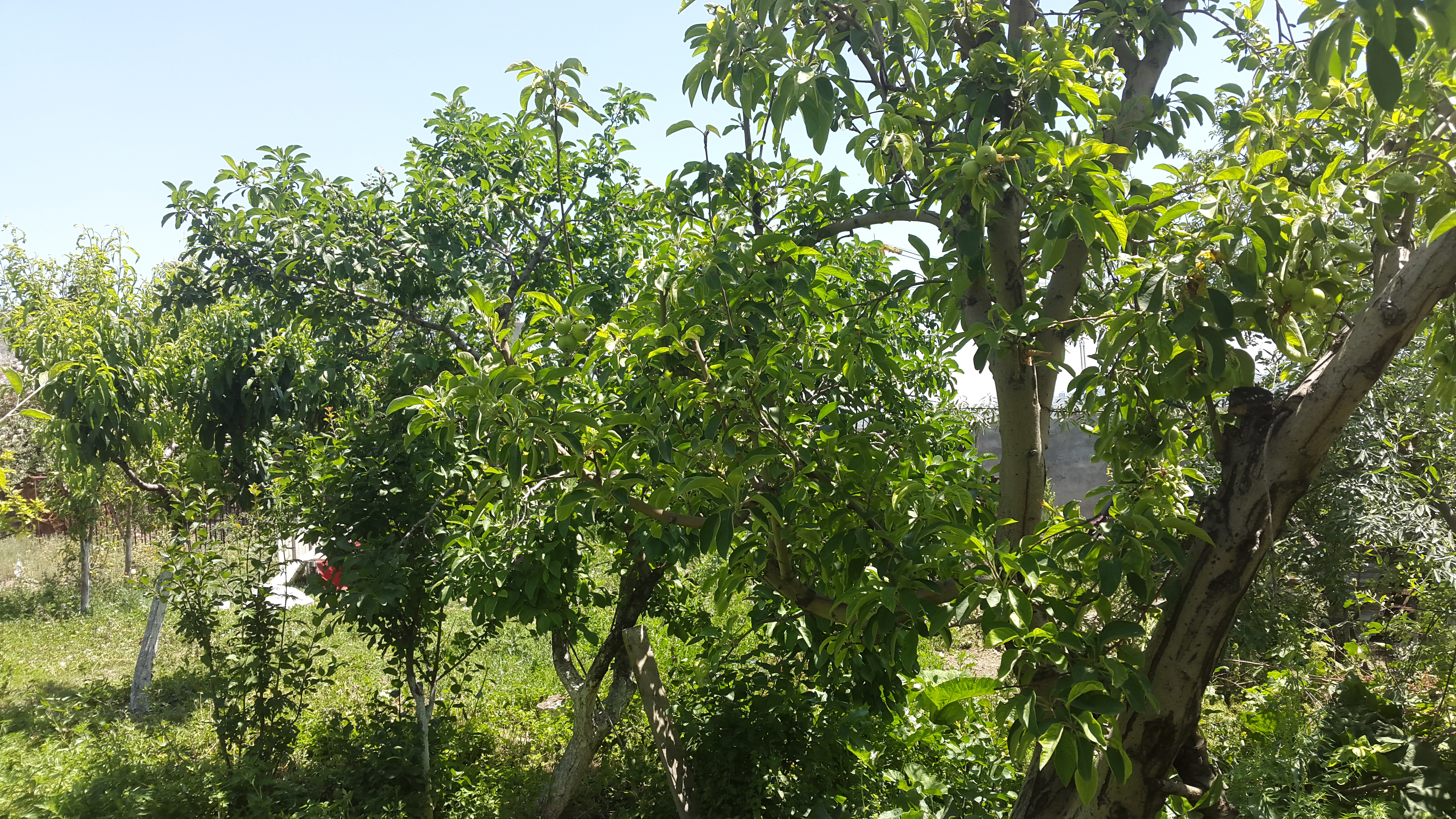 Դալմայի այգիներ